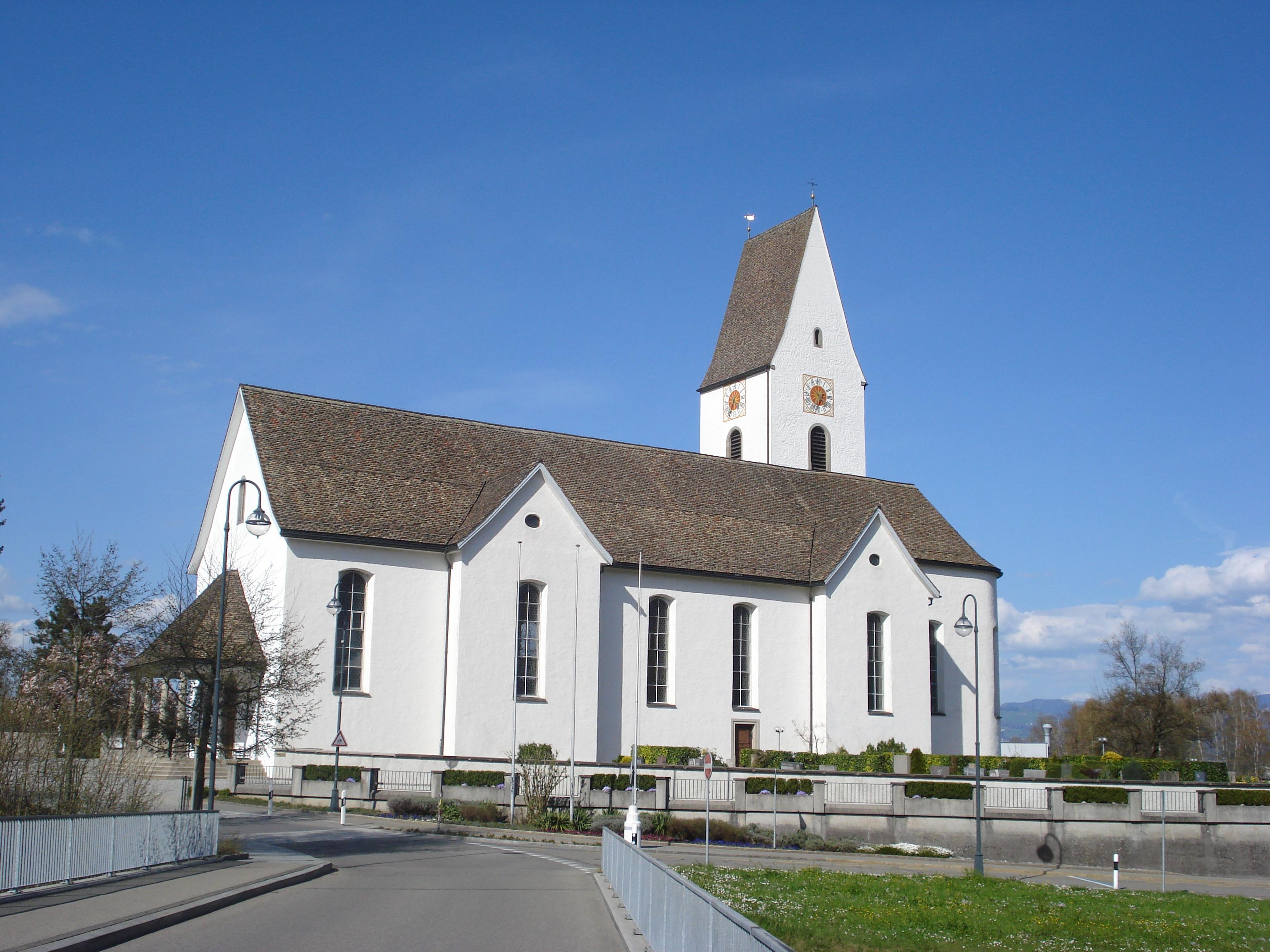 röm.-kath. Kirche Freienbach SZ